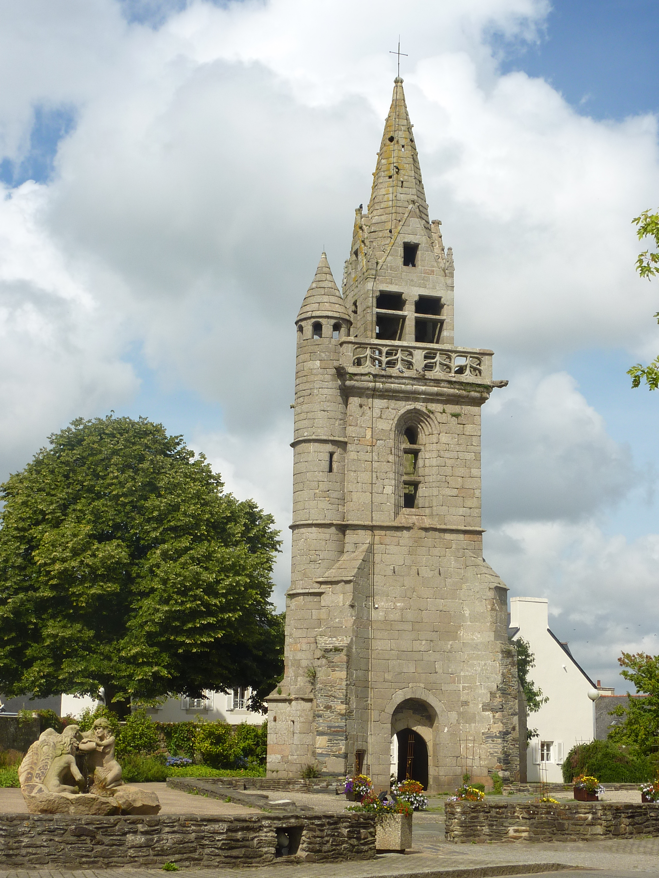 Taulé : le vieux clocher